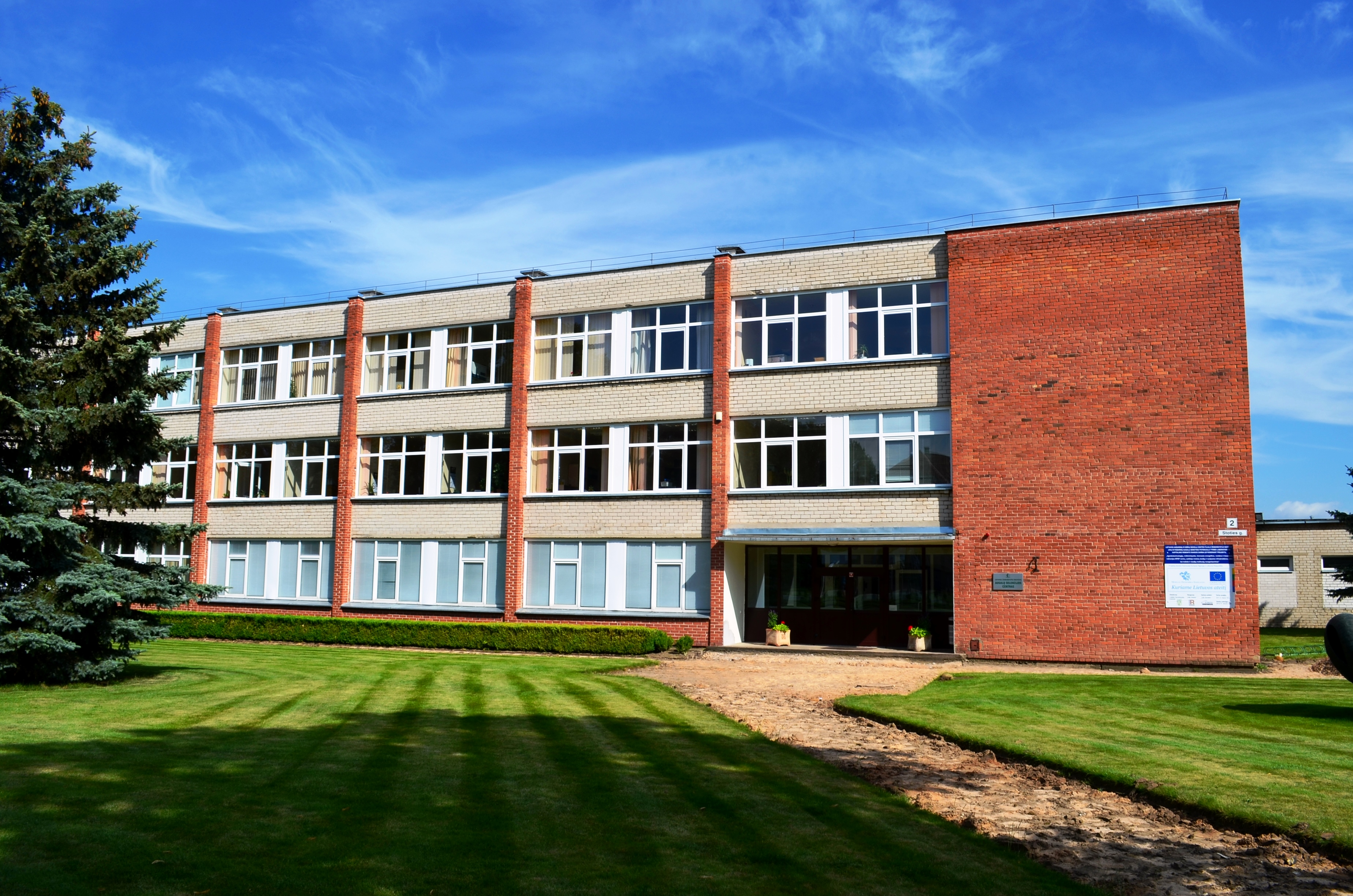 Augalų selekcijos centras, Akademija, Kėdainių raj.